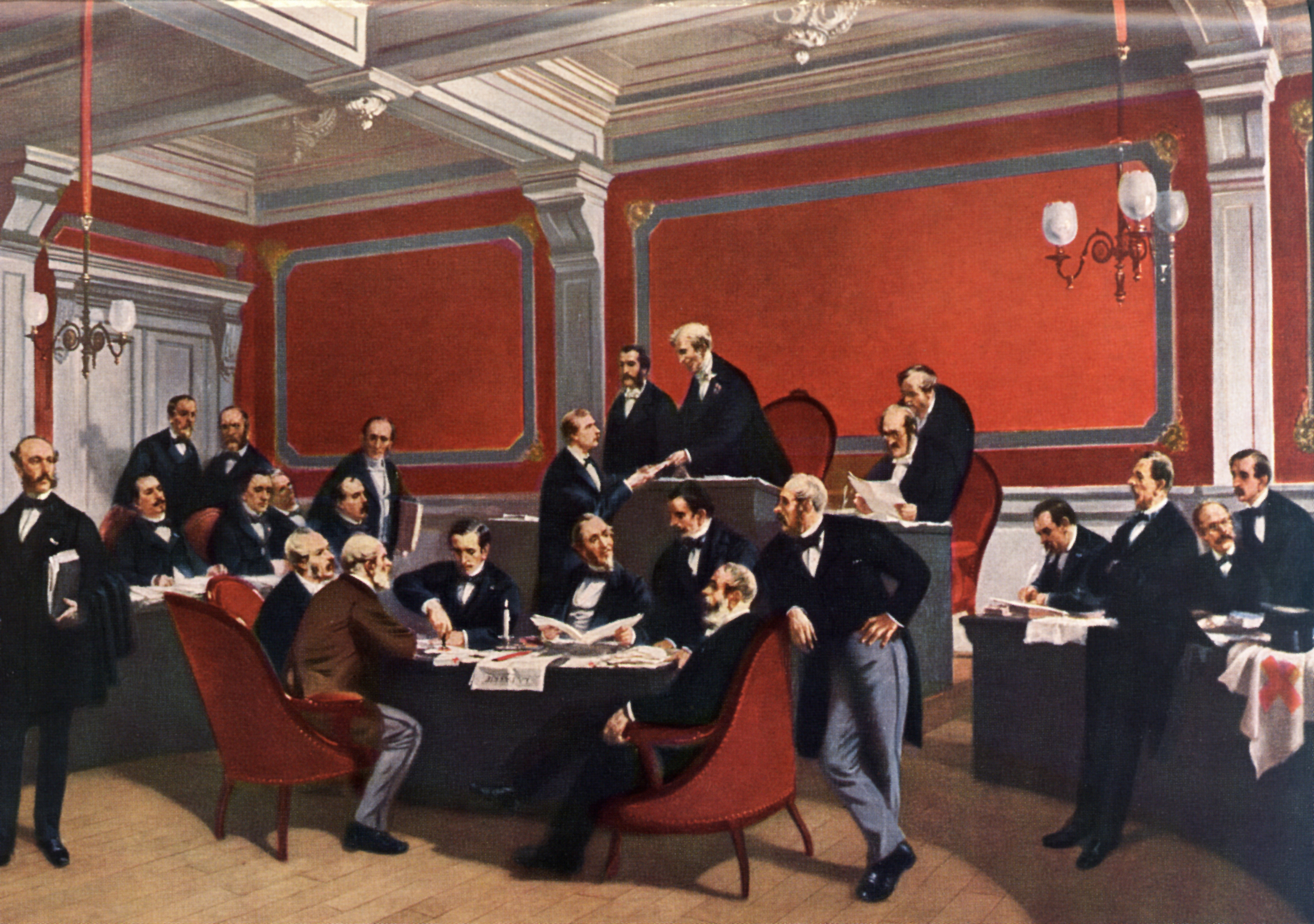 Am 22. August 1864 wird im Stadthaus von Genf die erste Genfer Konvention unterzeichnet, Gemälde von Charles Édouard Armand-Dumaresq.